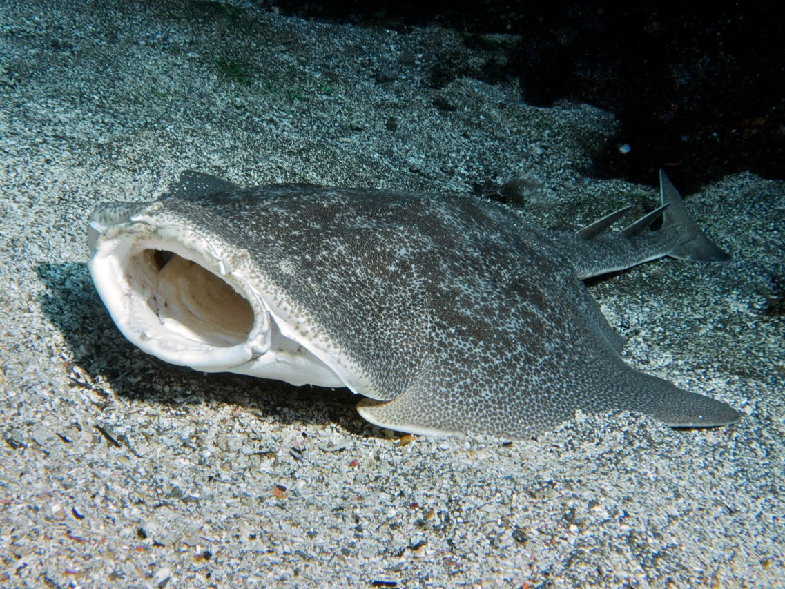 Japanese angelshark (Squatina japonica)